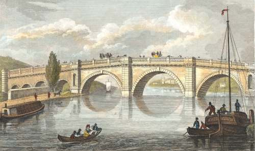 Brücke bei Ferrybridge über den River Aire Ferrybridge